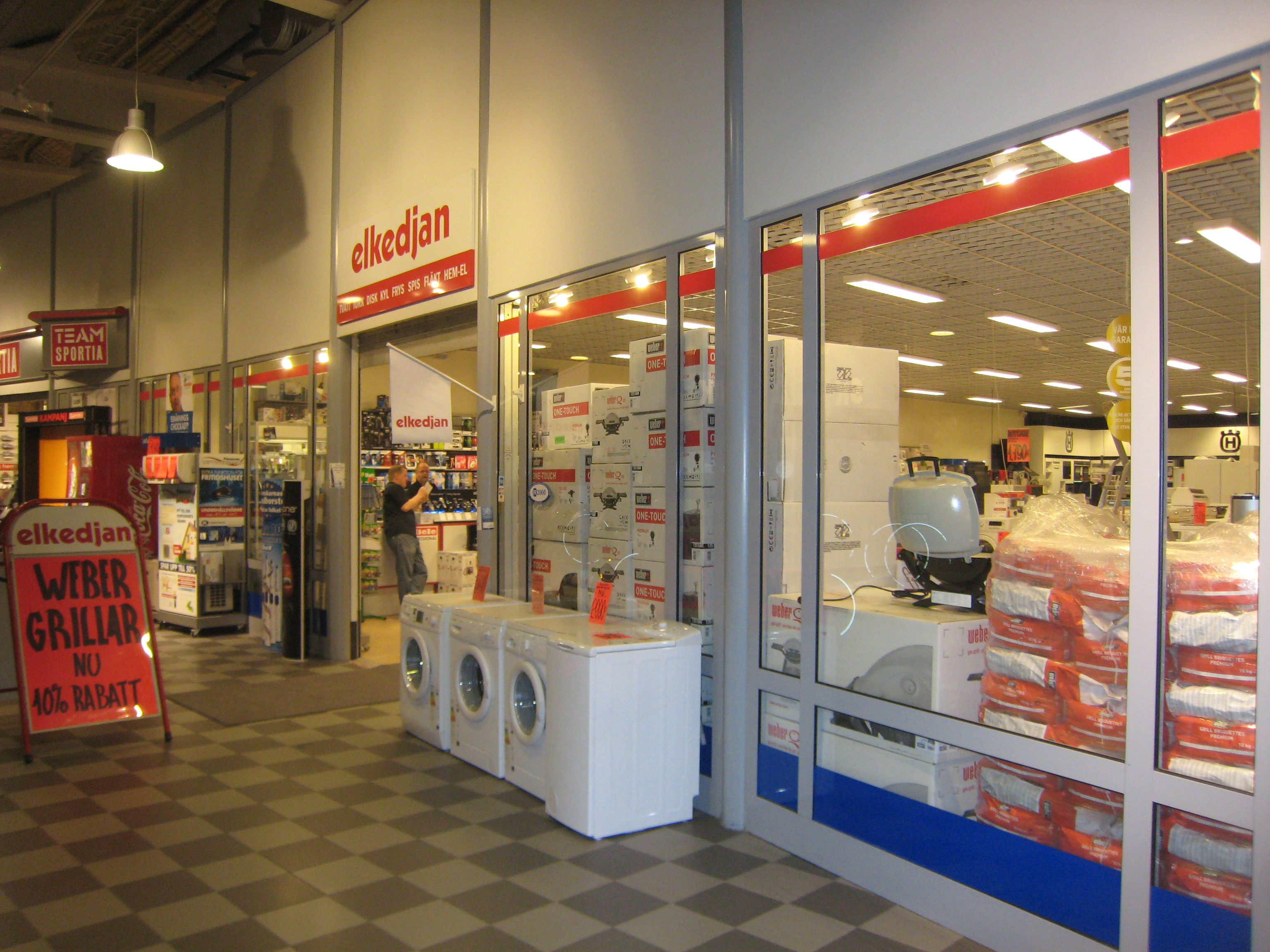 Elkedjan in Sickla.